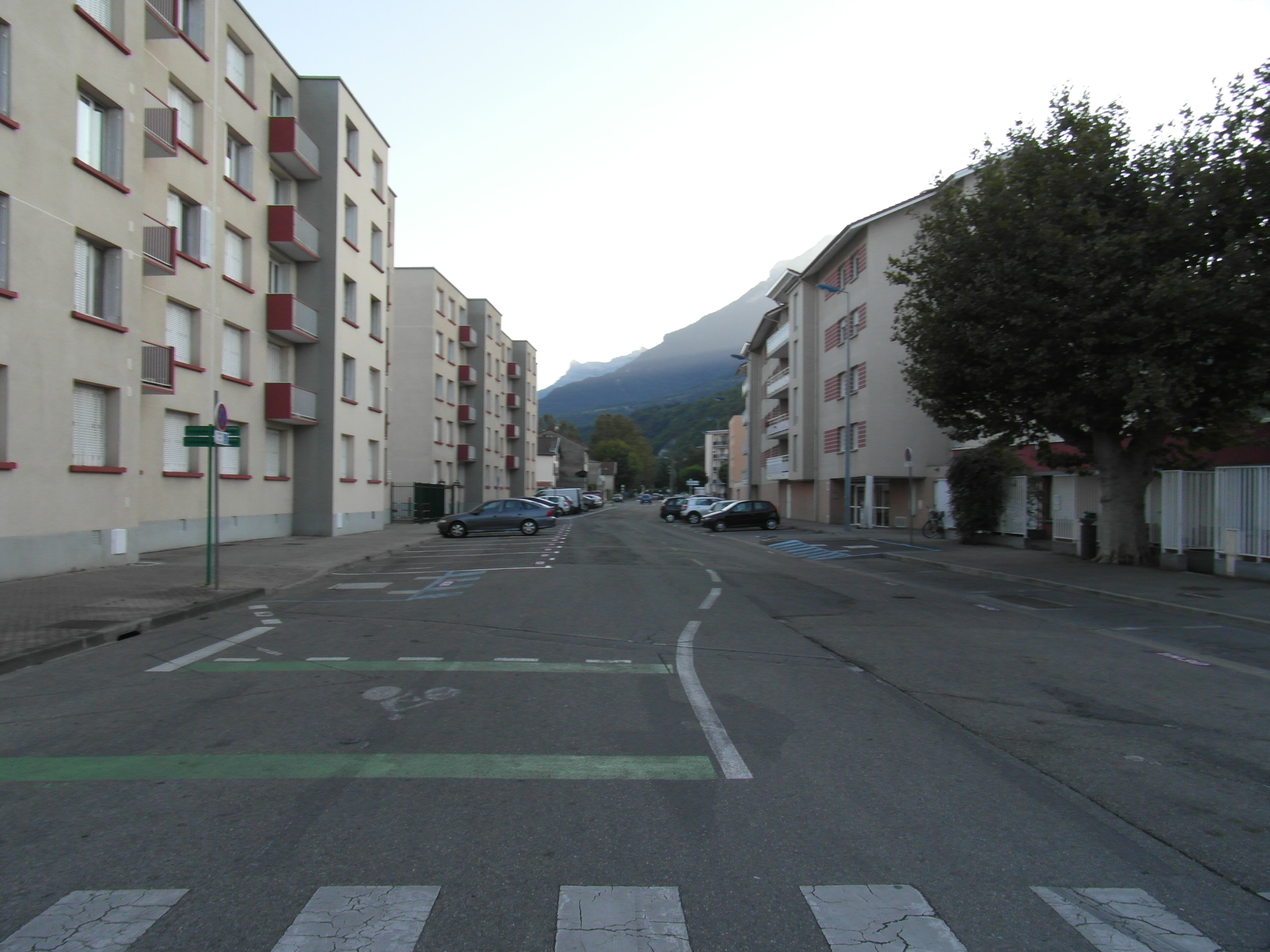 Avenue Joliot Curie Fontaine